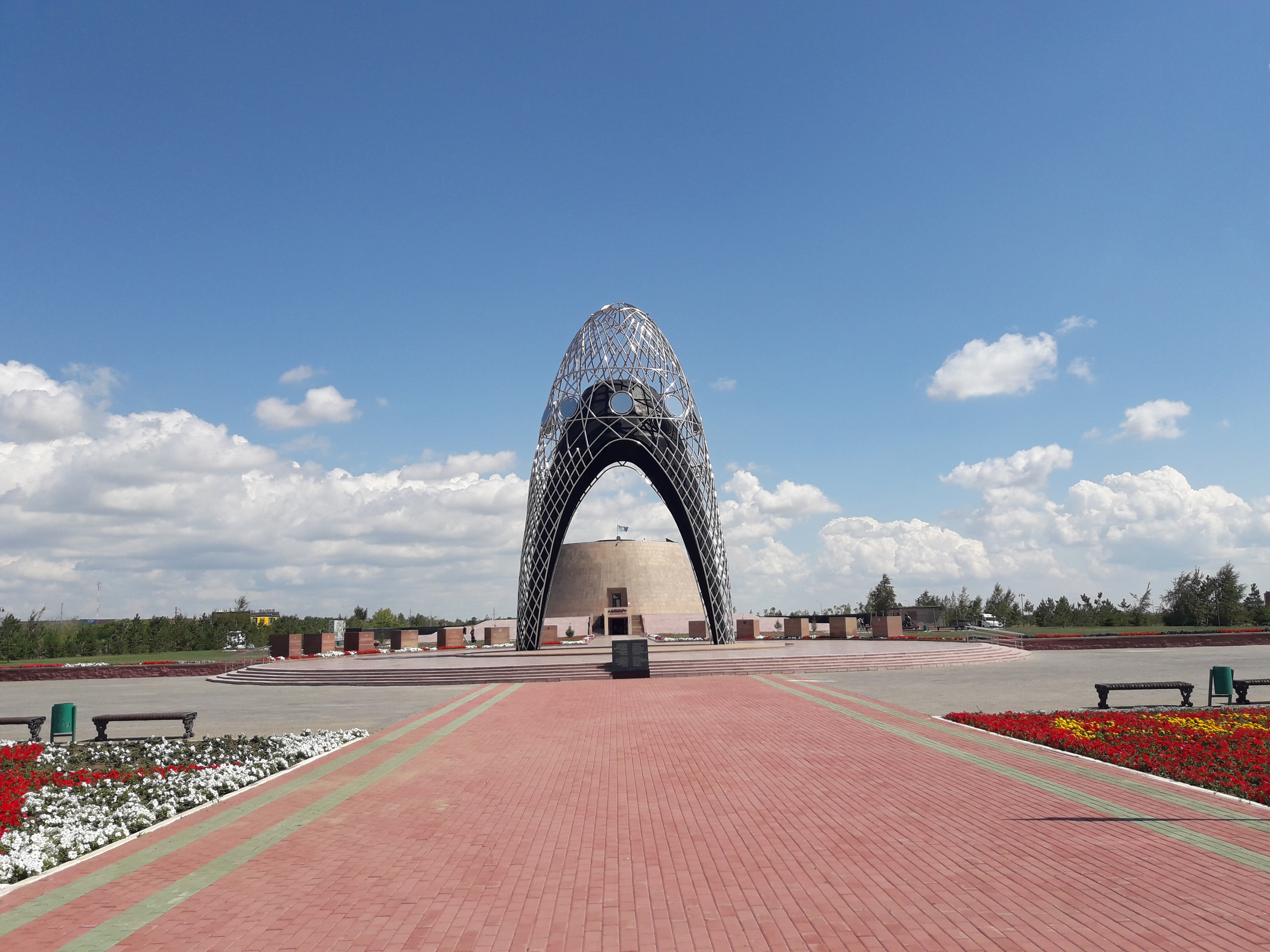 AŁŻIR